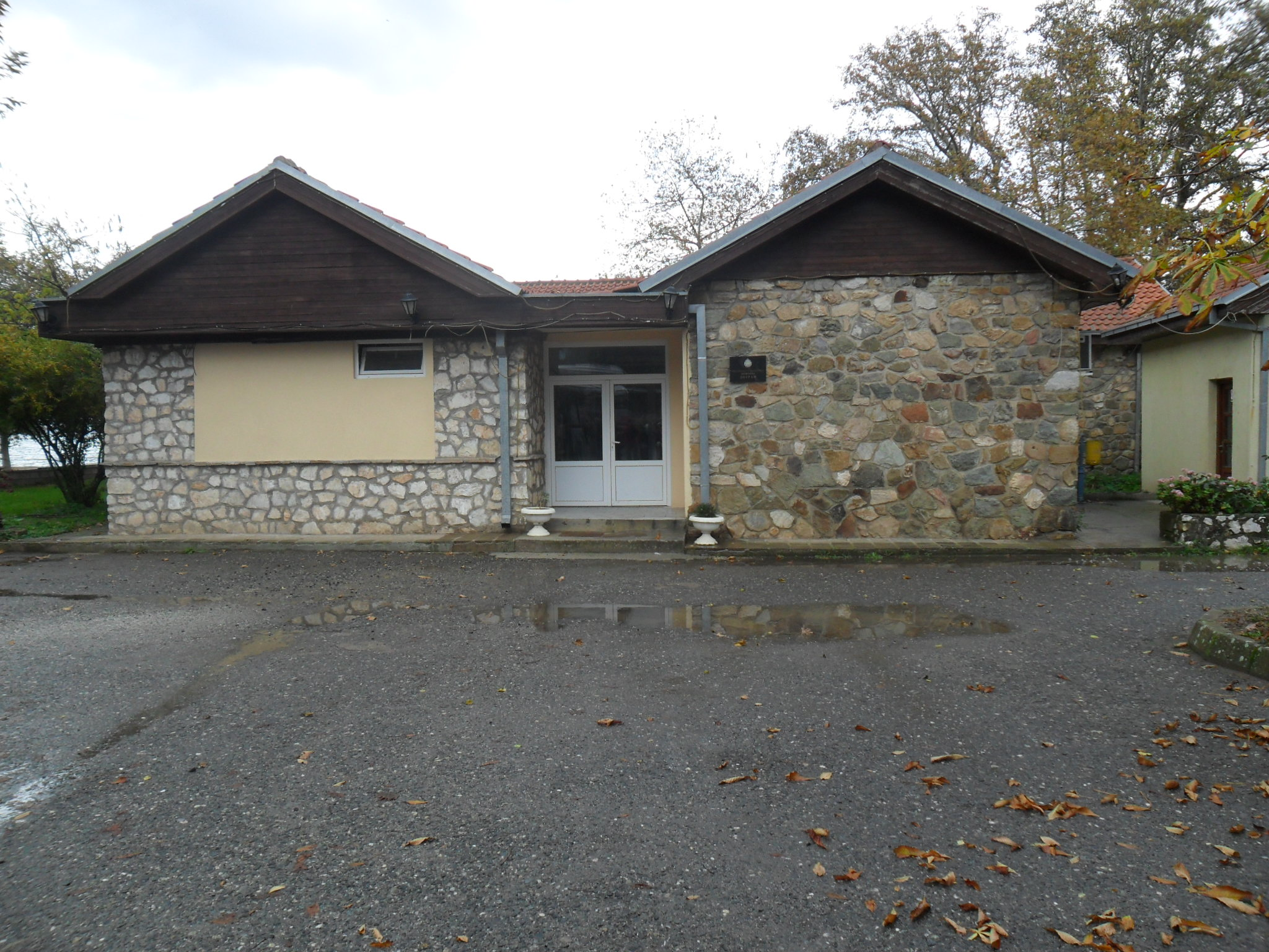 En:Old Dojran Municipality; Bg:Община Стар Дойран Mk: Општина Стар Дојран